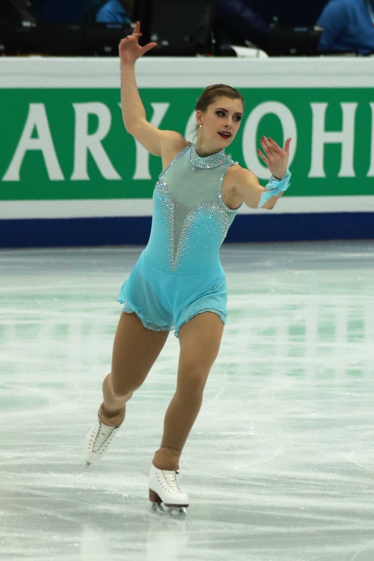 Элишка Бржезинова (Чехия) на Чемпионате Европы по фигурному катанию 2018.